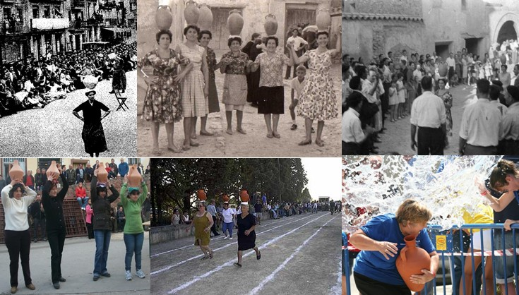 Imágenes de las tradicionales paseadas o carreras de cántaros, típicas en diversas zonas de España y Portugal.